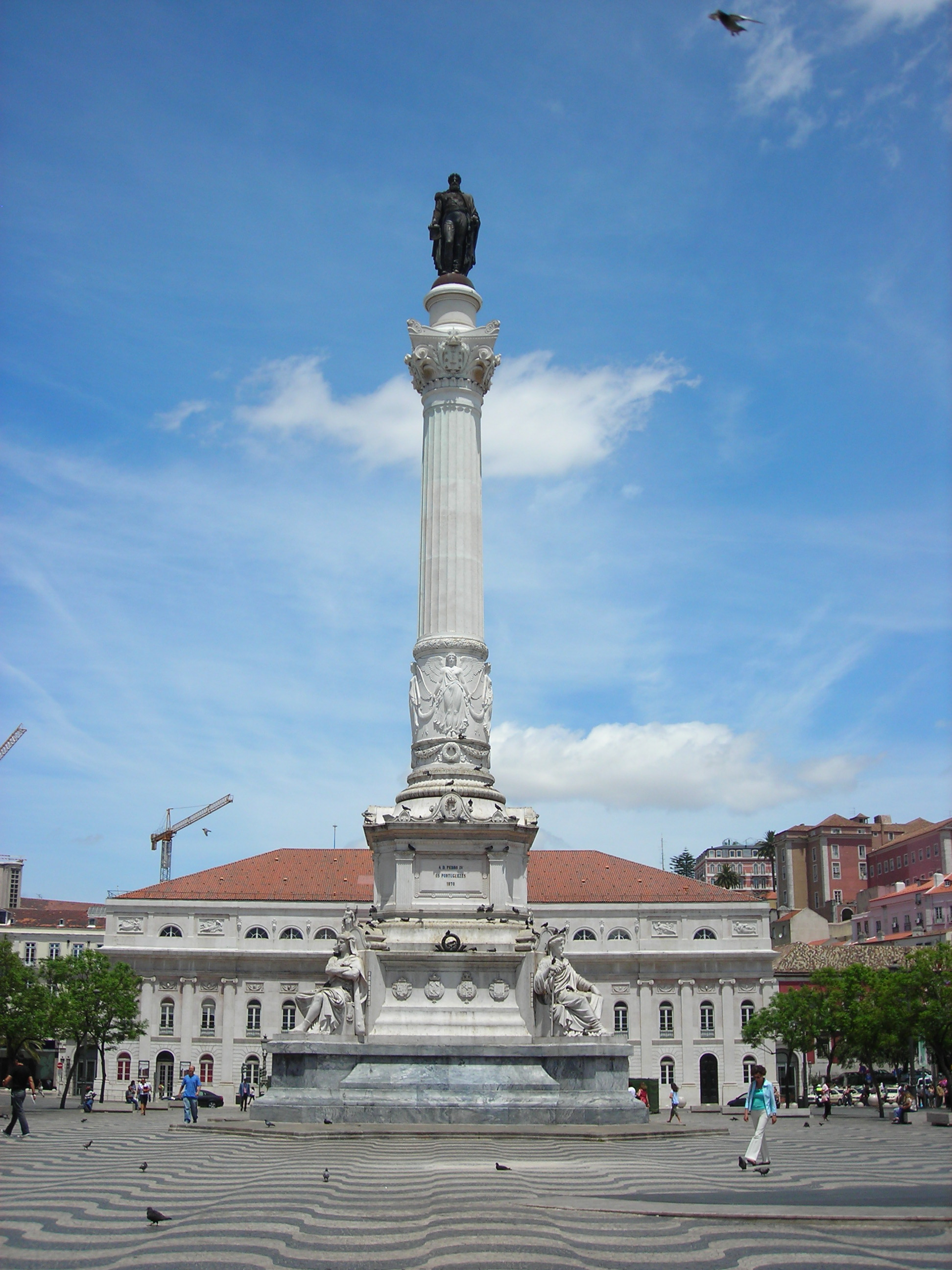 Estátua de D. Pedro IV no Rossio